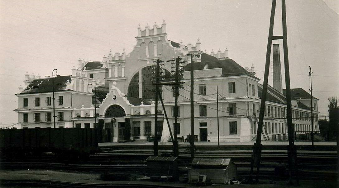 Беларуская (тарашкевіца): Берасьце (Bieraście), пляц Прывакзальны (plac Pryvakzalny). Чыгуначная станцыя Берасьце Цэнтральнае (Bieraście Centralnaje)